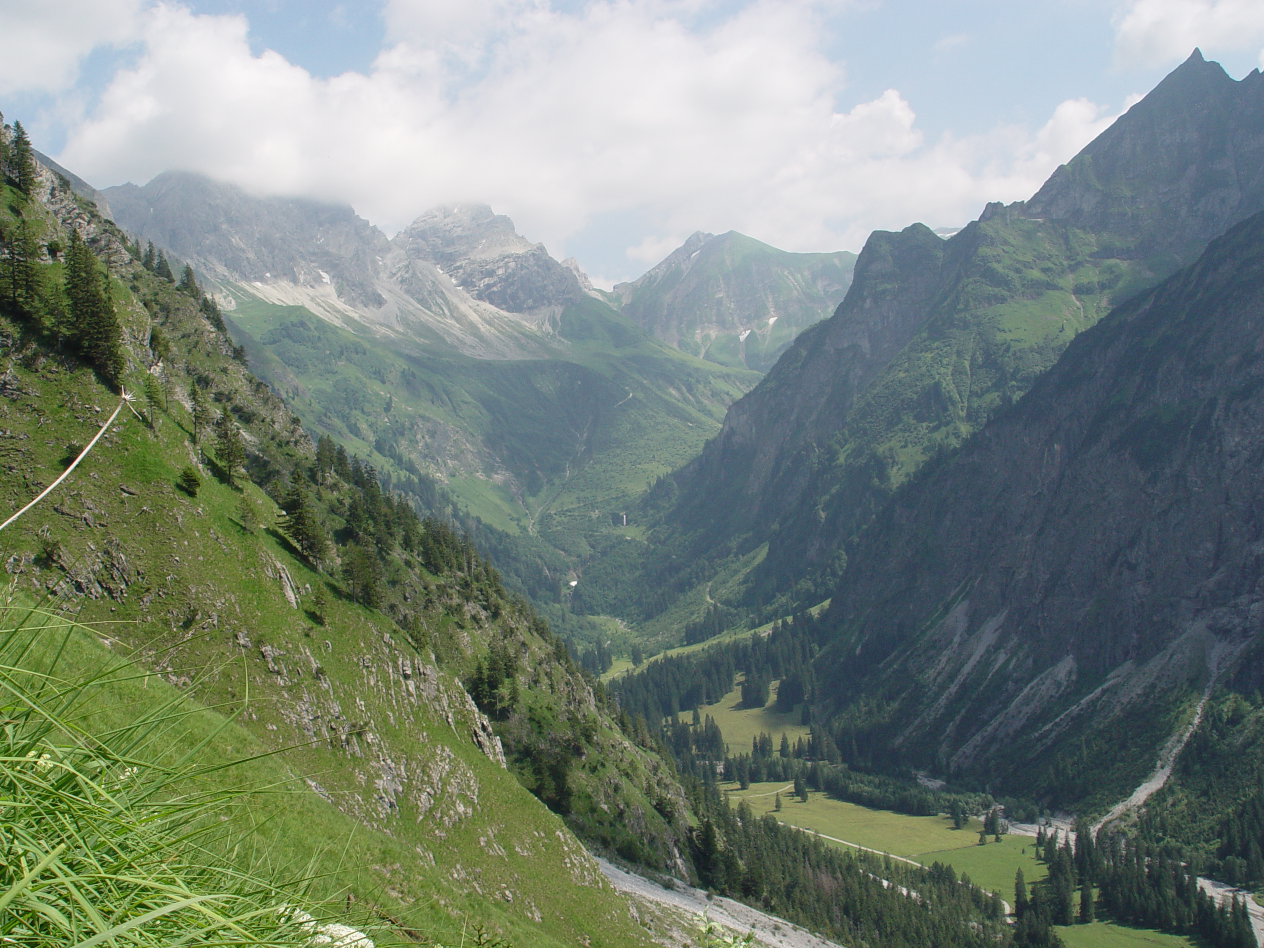 Das Oybachtal vom Gleitweg aus gesehen